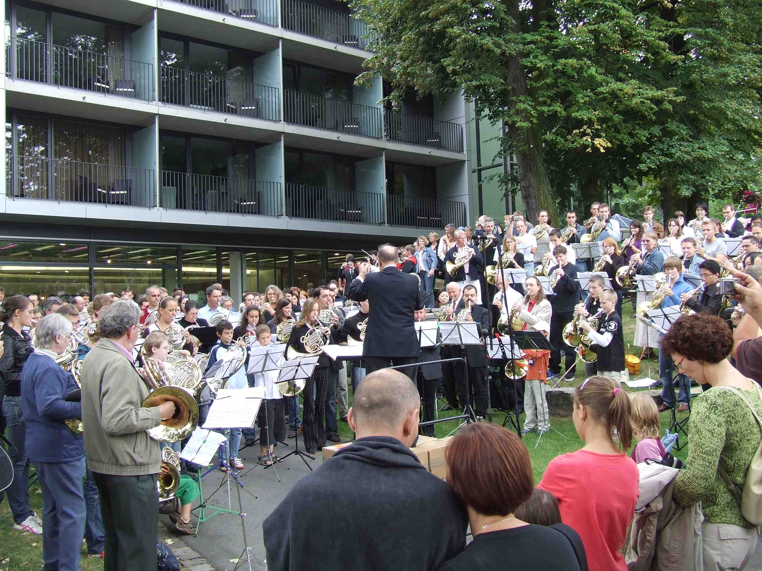 Gebr. Alexander Mainz in Mainz